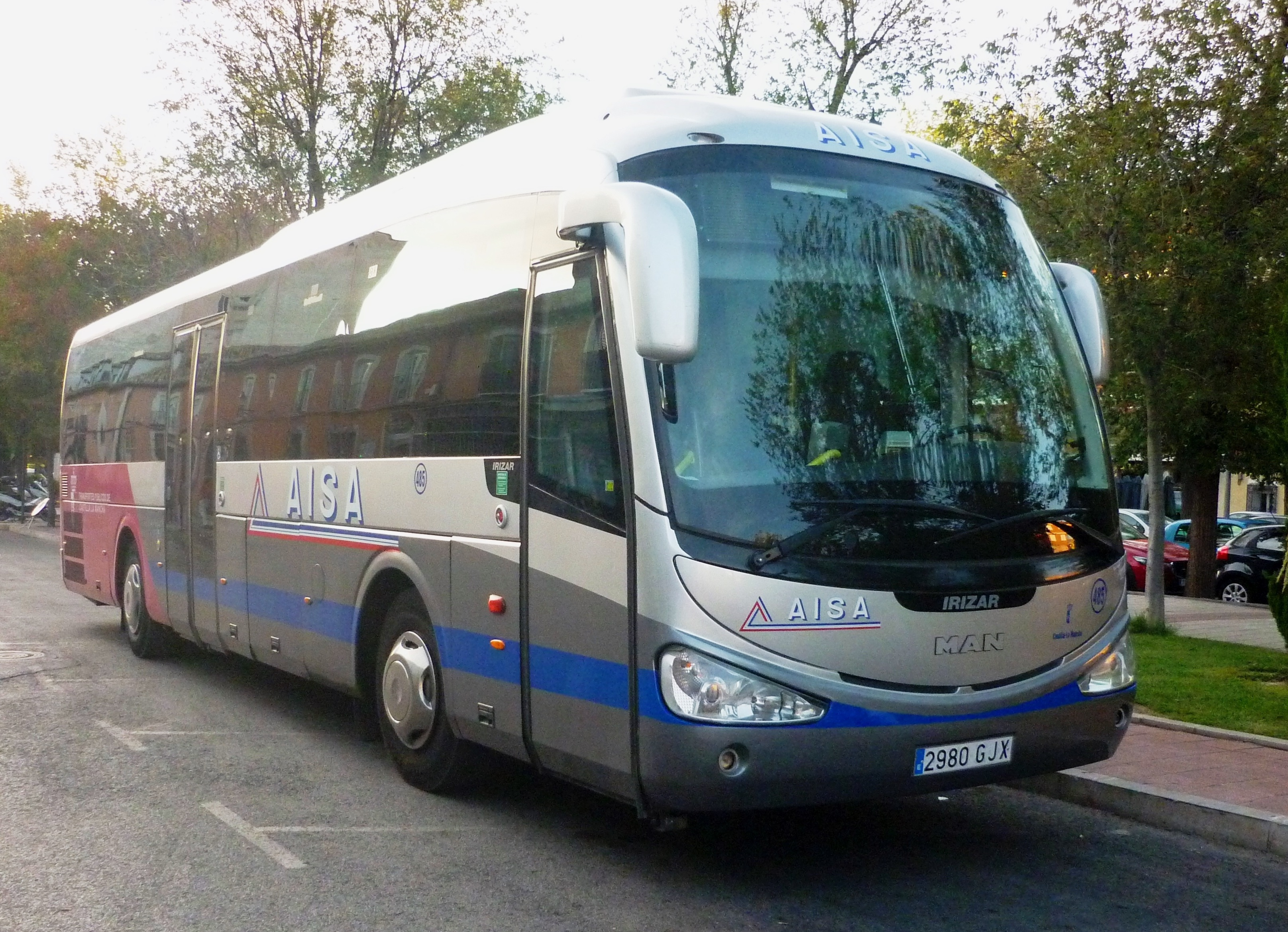 485_AISA